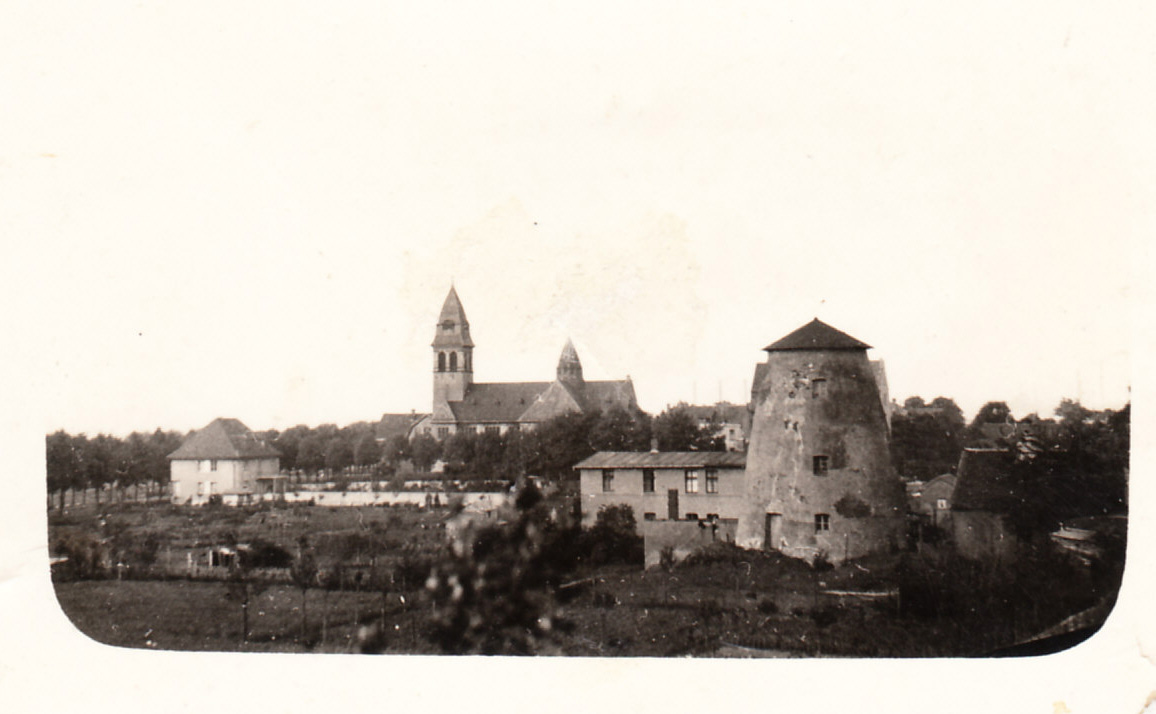 Historische Aufnahme des Bochumer Stadtteils Höntrop aus dem Jahr 1930 mit der Kirche St. Maria Magdalena. Gebiet südlich des Wattenscheider Hellweges, der sich links hinter der Baumreihe entlangzieht. Blick Richtung Nordosten